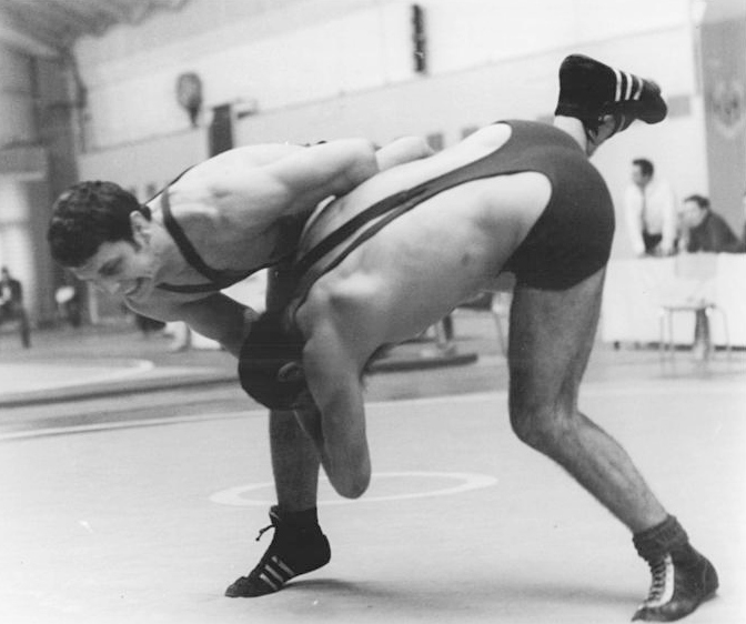 Horst Stoffmeister, Harald Richter Zentralbild Schaar 28.3.71-pe Halle: DDR-Meisterschaften im Freien Ringkampf Europameister Horst Stoffmeister (1.) vom SCL besiegte Harald Richter von Wismut Aue in der Gewichtsklasse 90 kp nach wenigen Sekunden durch Schultersieg.